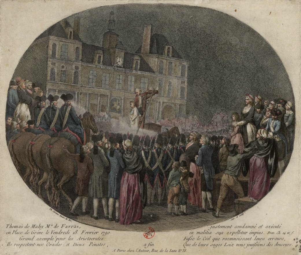 Thomas de Mahy m.is de Favras, justement condamné et exécuté en place de Grève le vendredi 18 février 1790 : in malitia sua expelletur impius Prov. Ch. 14 inf. grand exemple pour les aristocrates fasse le ciel que reconnoissant leurs erreurs, ils respectent nos oracles et dieux pénates, que de leurs sages loix nous jouissions des douceurs